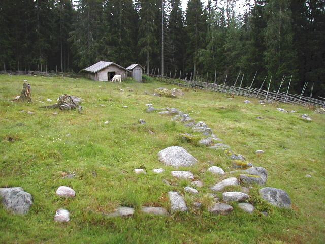 Husgrund_Ransbysetern